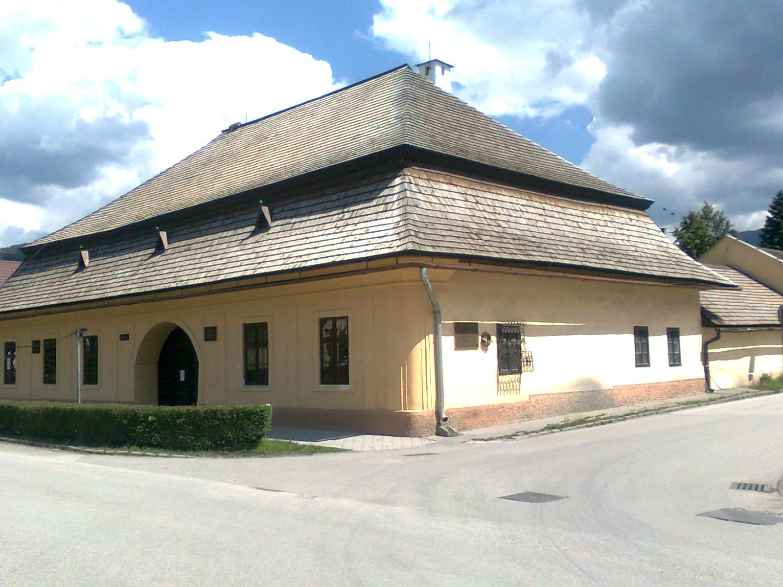 Kúria pamätná